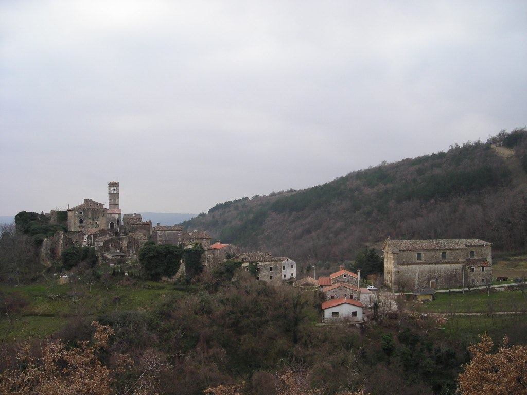 Panorama -Piemonte d'Istria